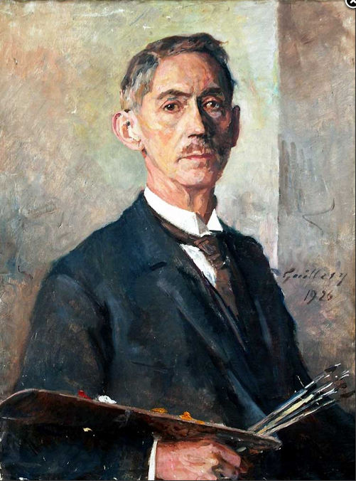 Selbstportrait